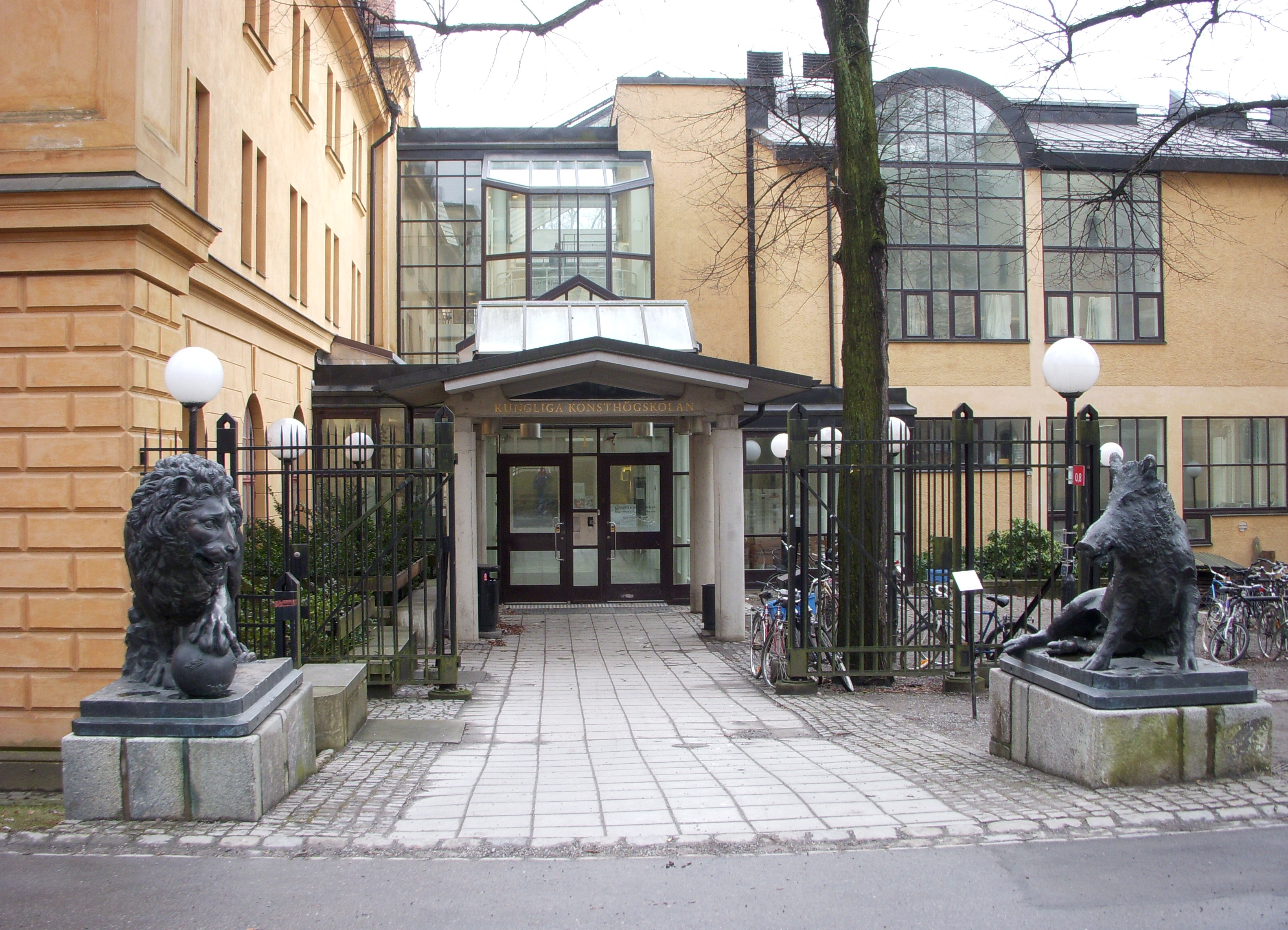 Konsthögskolan på Skeppsholmen i Stockholm, entré